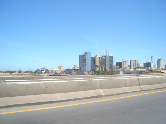 centro de campos pela ponte Rosinha